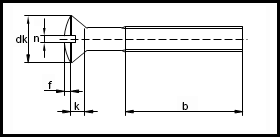 ISO 2010